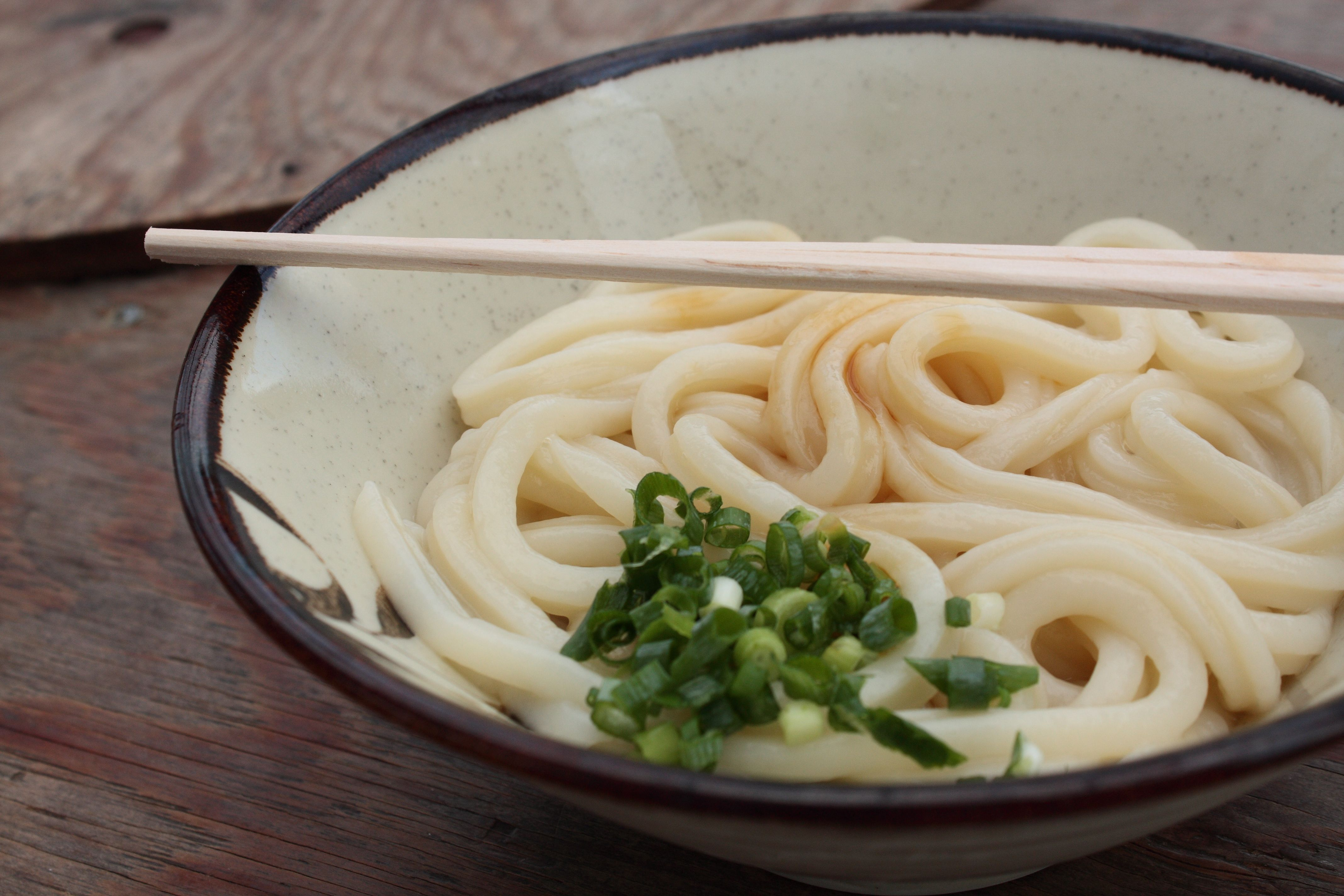 釜揚げの讃岐うどん（香川県高松市香川町川東下字高須899-1、仏生山駅から約5kmにある「池上製麺所 / るみ（瑠美子）ばあちゃんのうどん店」[1]）